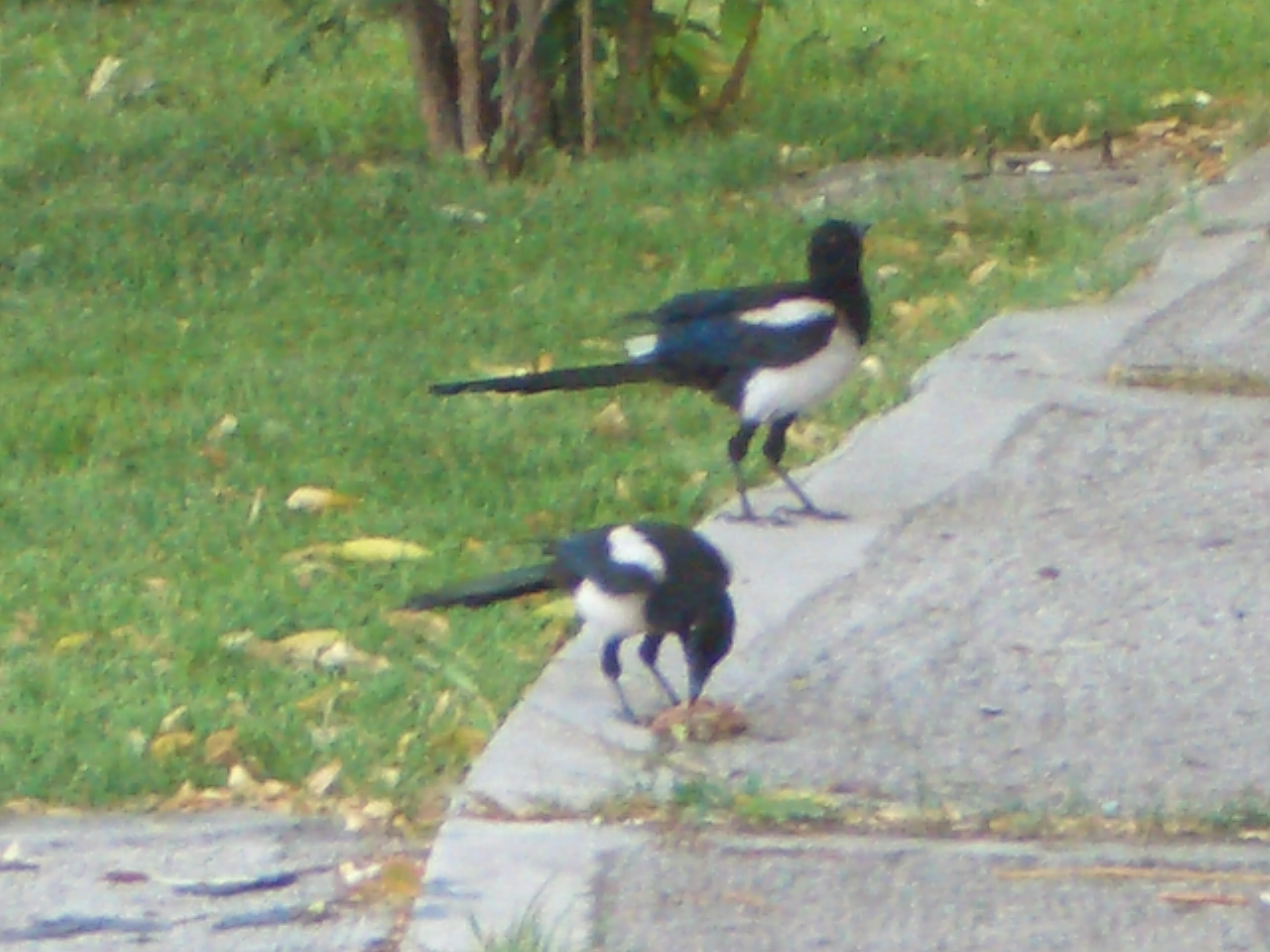 Karga